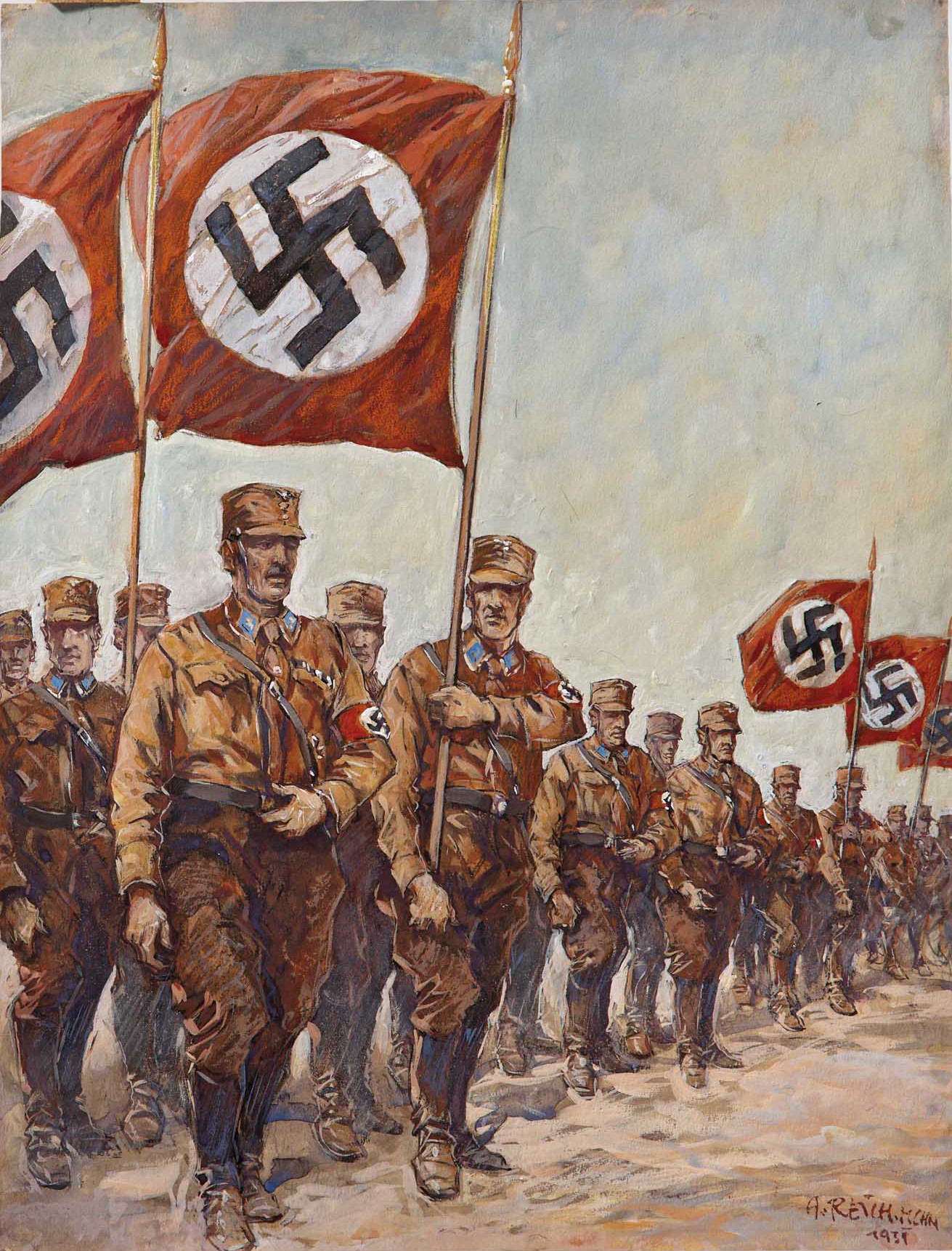 Albert Reich (1881–1942) – Die lebendige Front (1931).jpg